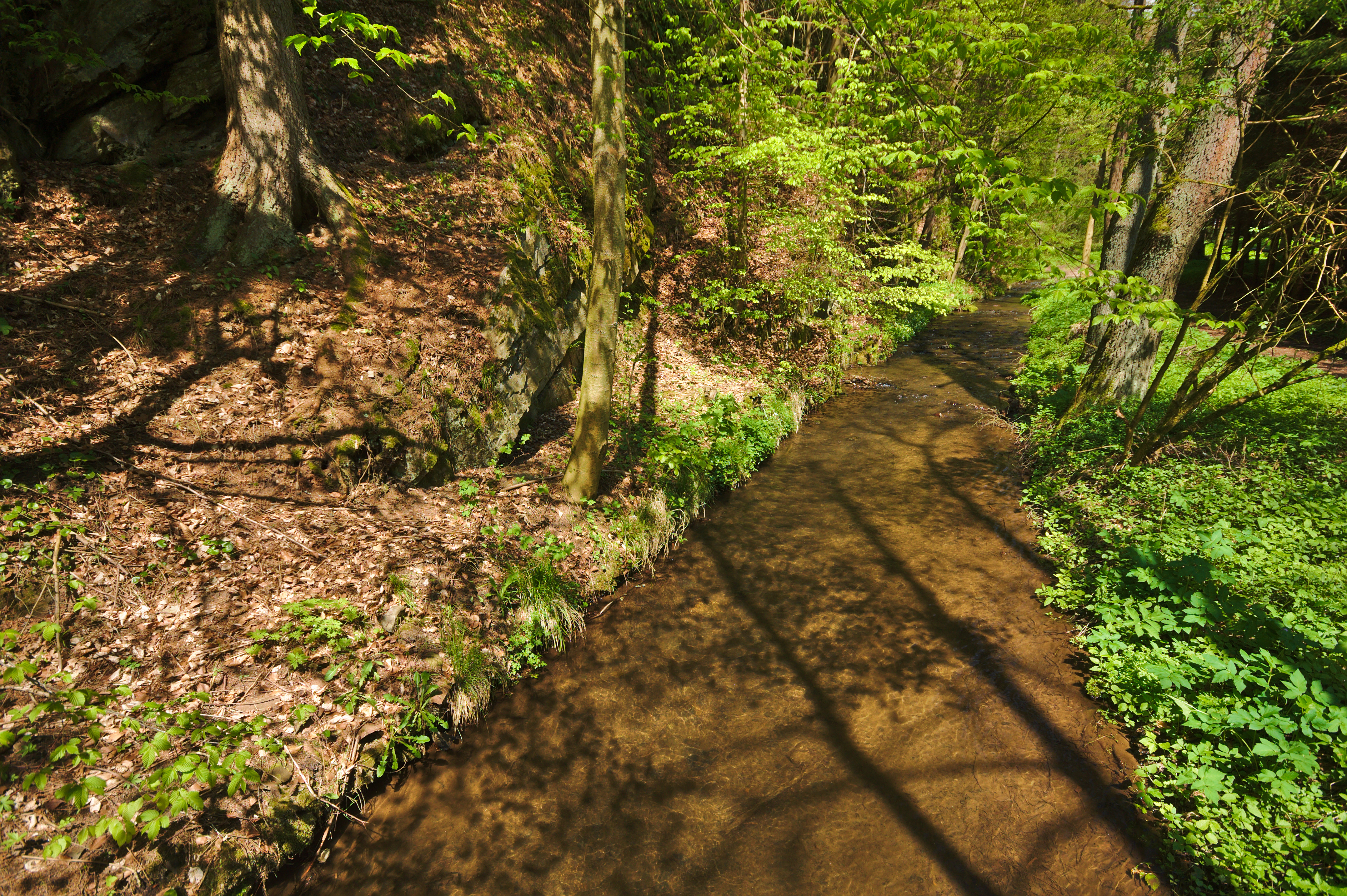 Tresenský potok, okres Žďár nad Sázavou